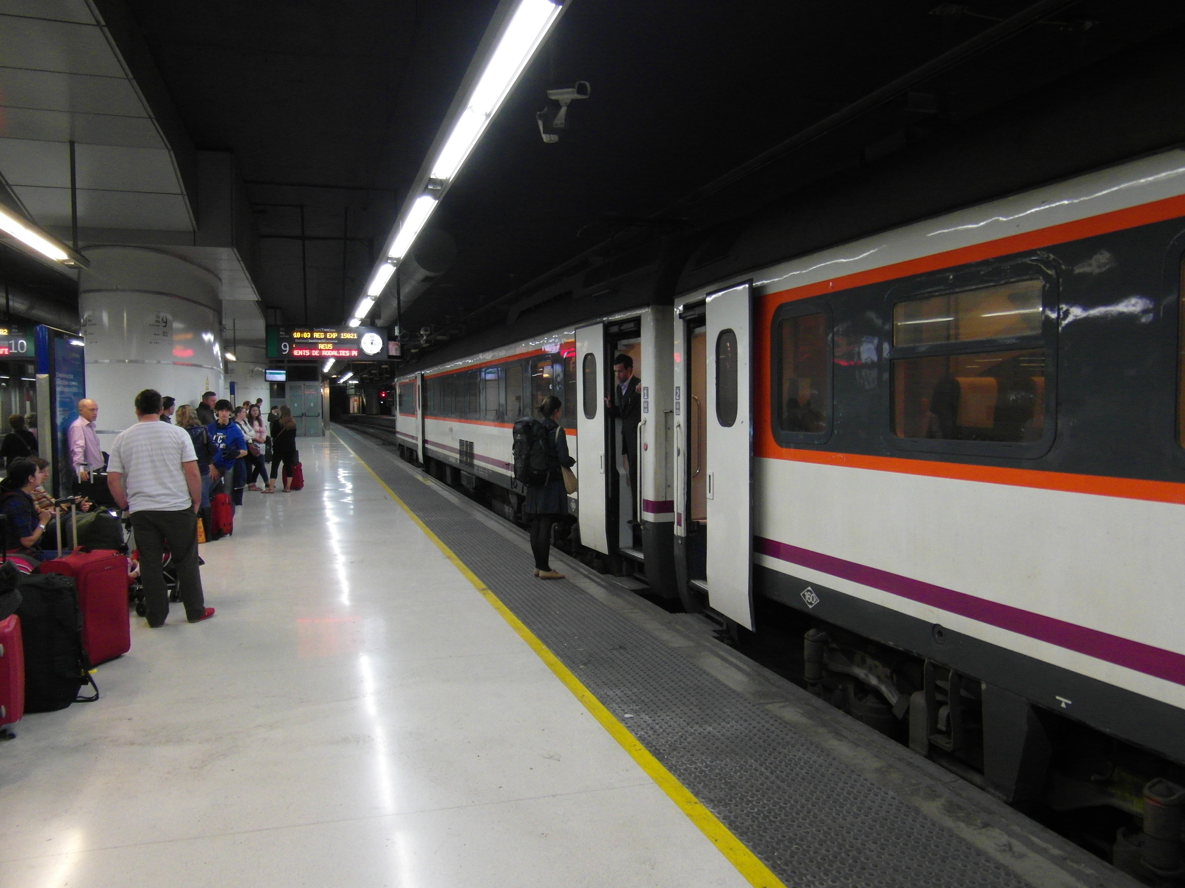 Estación de Barcelona Sants.